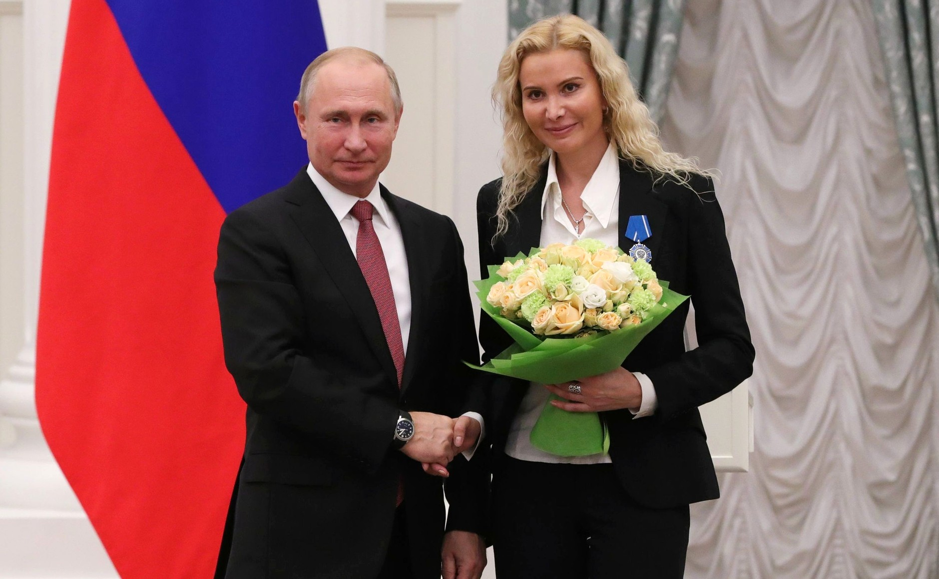 Орденом Почёта награждена тренер по фигурному катанию Этери Тутберидзе.